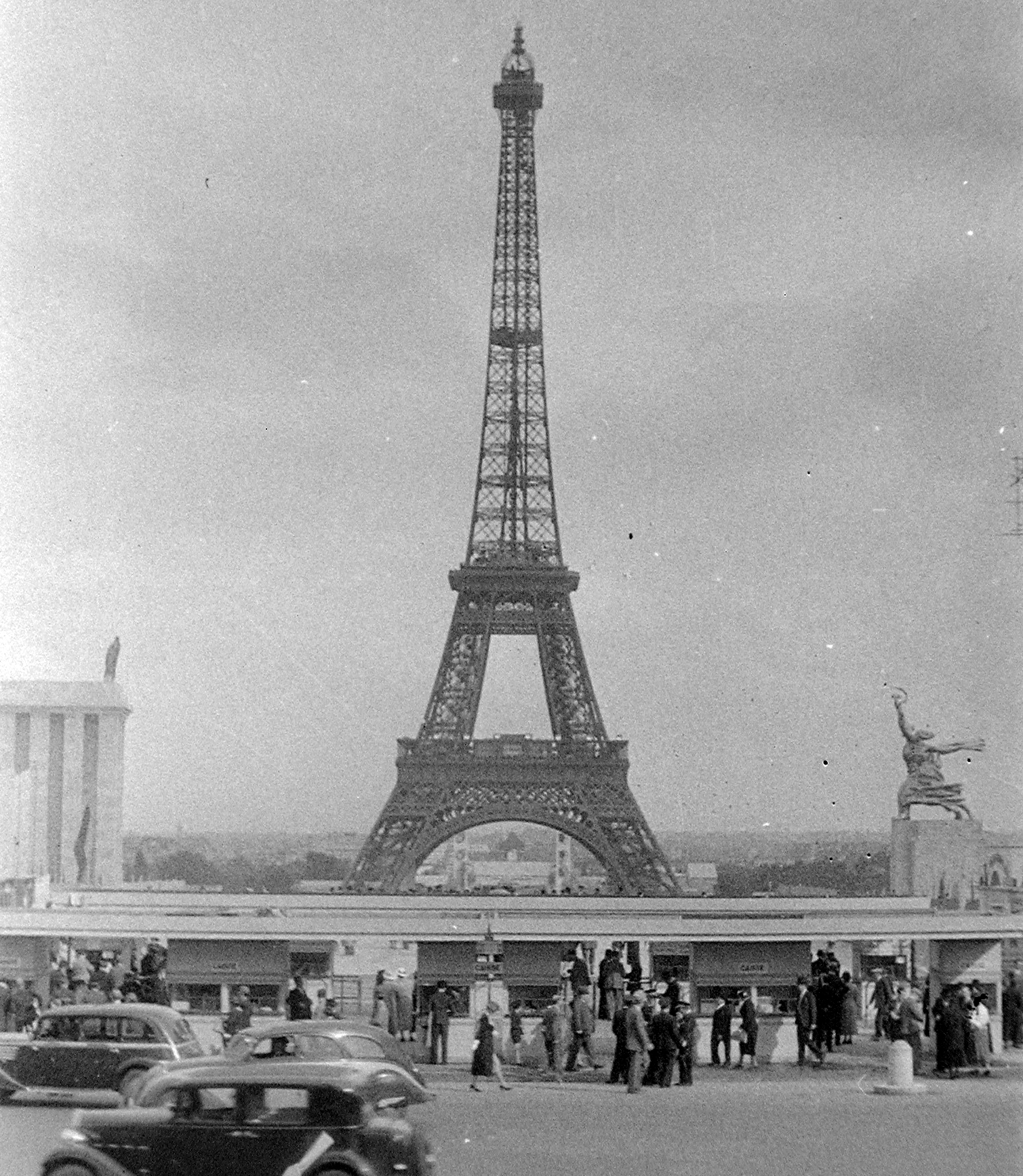 Eiffel-torony, Világkiállítás 1937. Location: France, Paris Tags: international fair, tower Title: Eiffel-torony, Világkiállítás 1937.